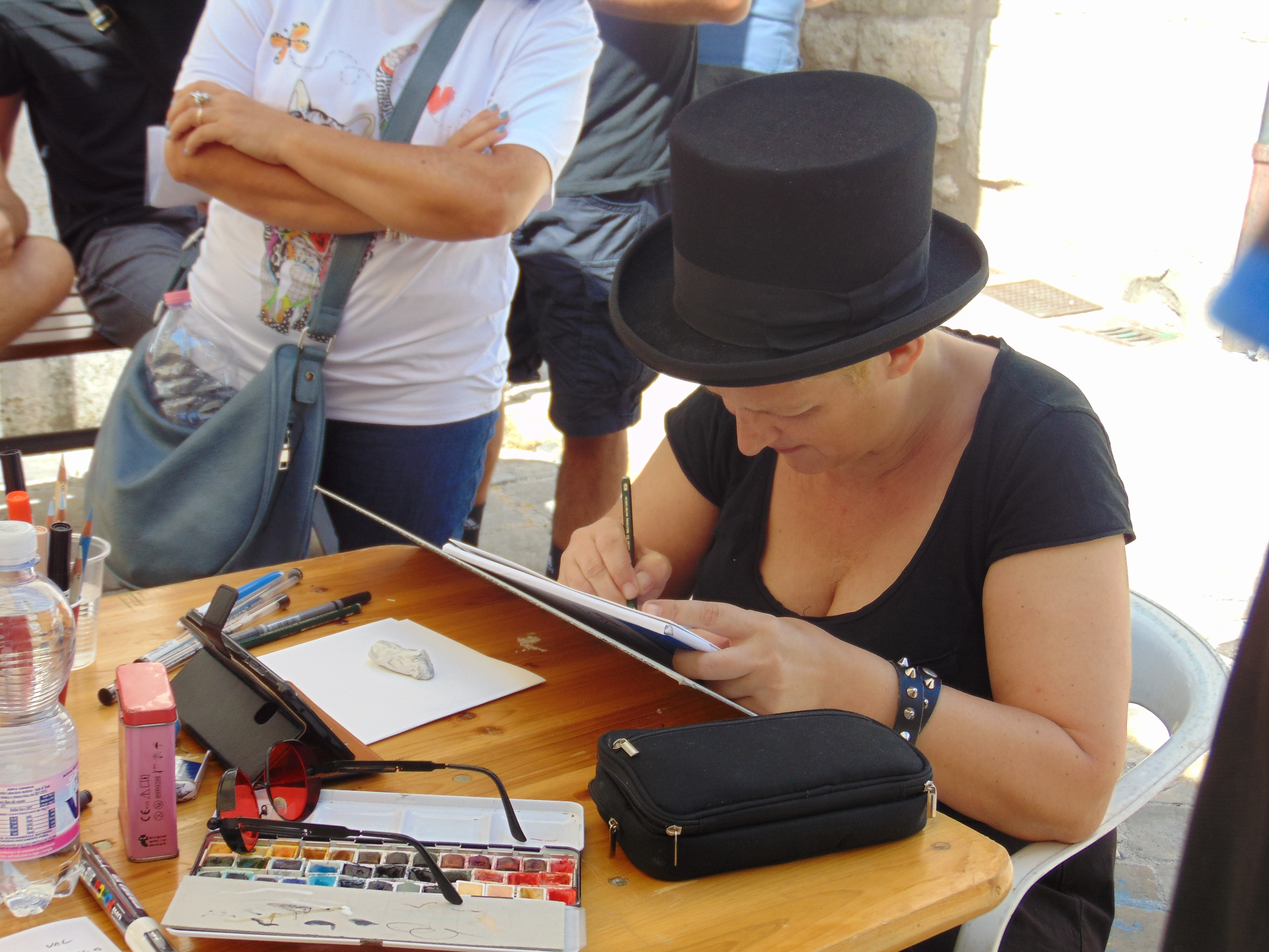 Narni Comics & Games 2019 - Lola Airaghi